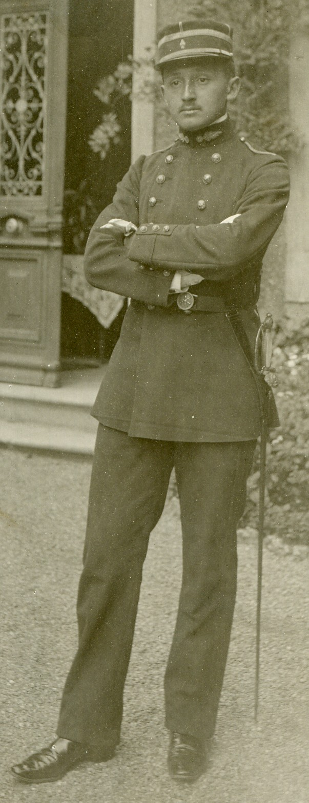 Photo de Léon Daum en polytechnicien